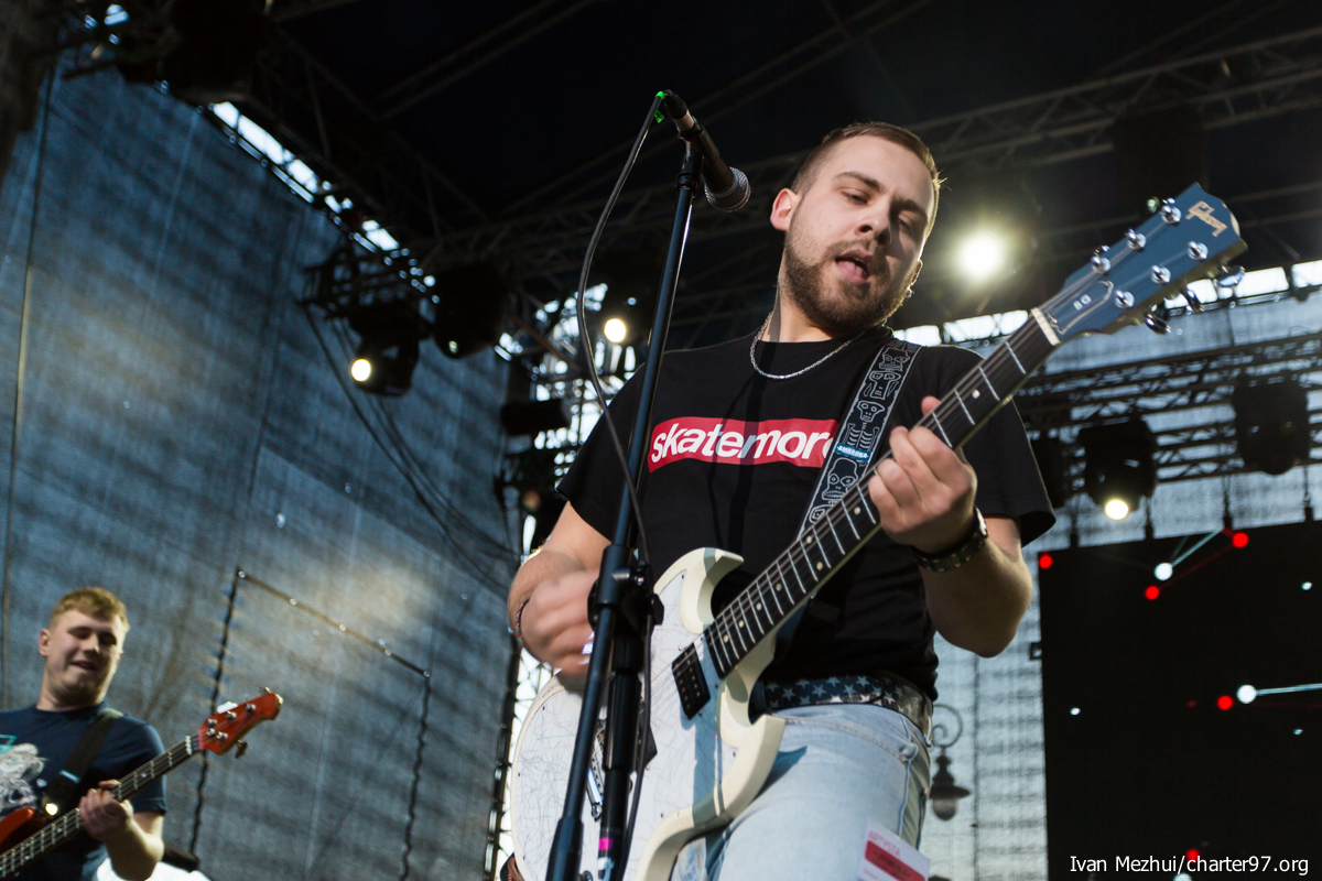 Koncert "Solidarni z Białorusią" 12 kwietnia 2014 roku na ul. gen. Tokarzewskiego-Karaszewicza w Warszawie.